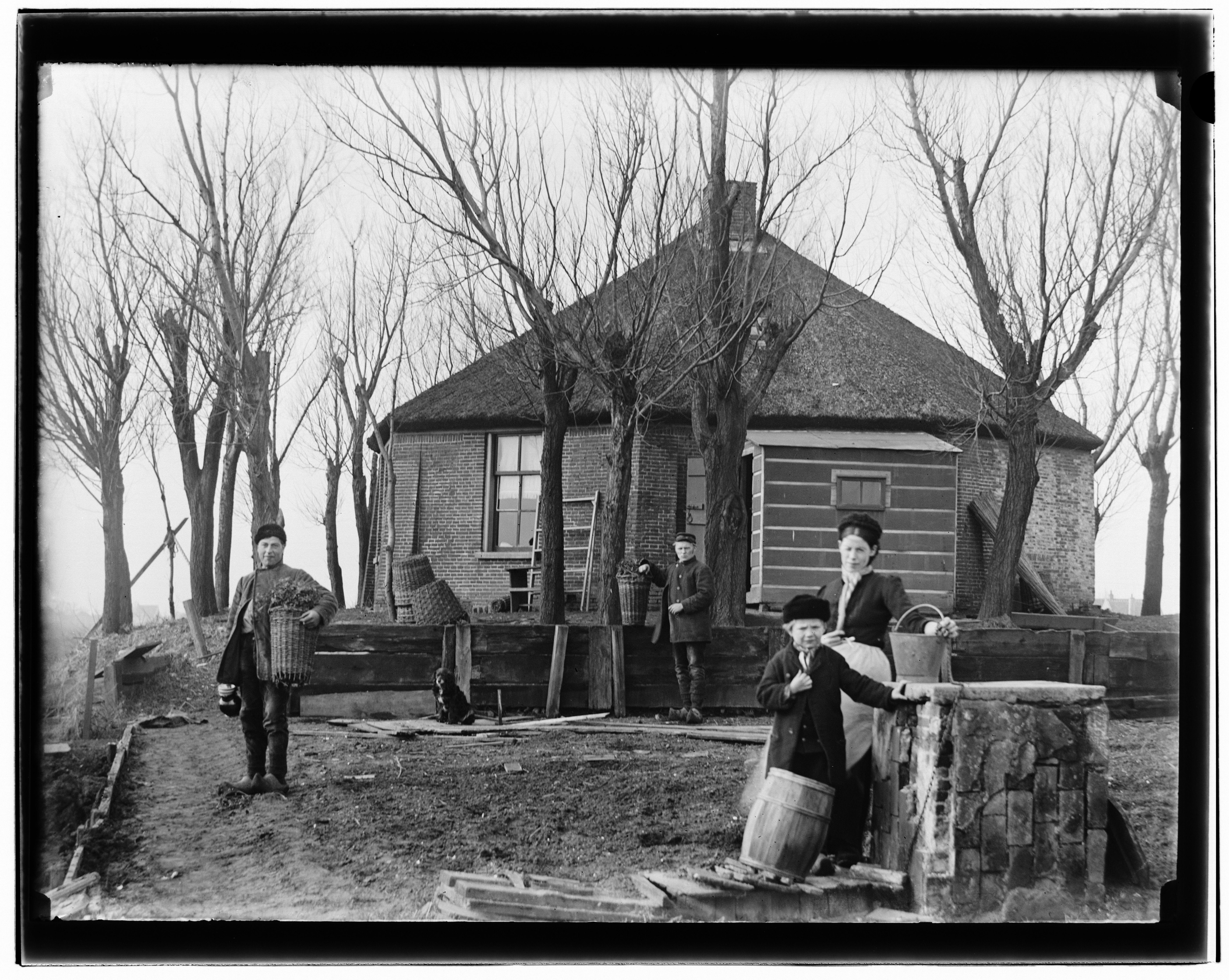 Beschrijving Ververspad (na 1896: Tolstraat). Romp molen nr.1 van Binnendijksche Buitenveldersche Polder Documenttype foto Vervaardiger Olie``, Jacob (1834-1905) Collectie Collectie Jacob Olie Jbz. Datering 1891 Geografische naam Ververspad Inventarissen Afbeeldingsbestand 10019A000915 Generated with Dememorixer